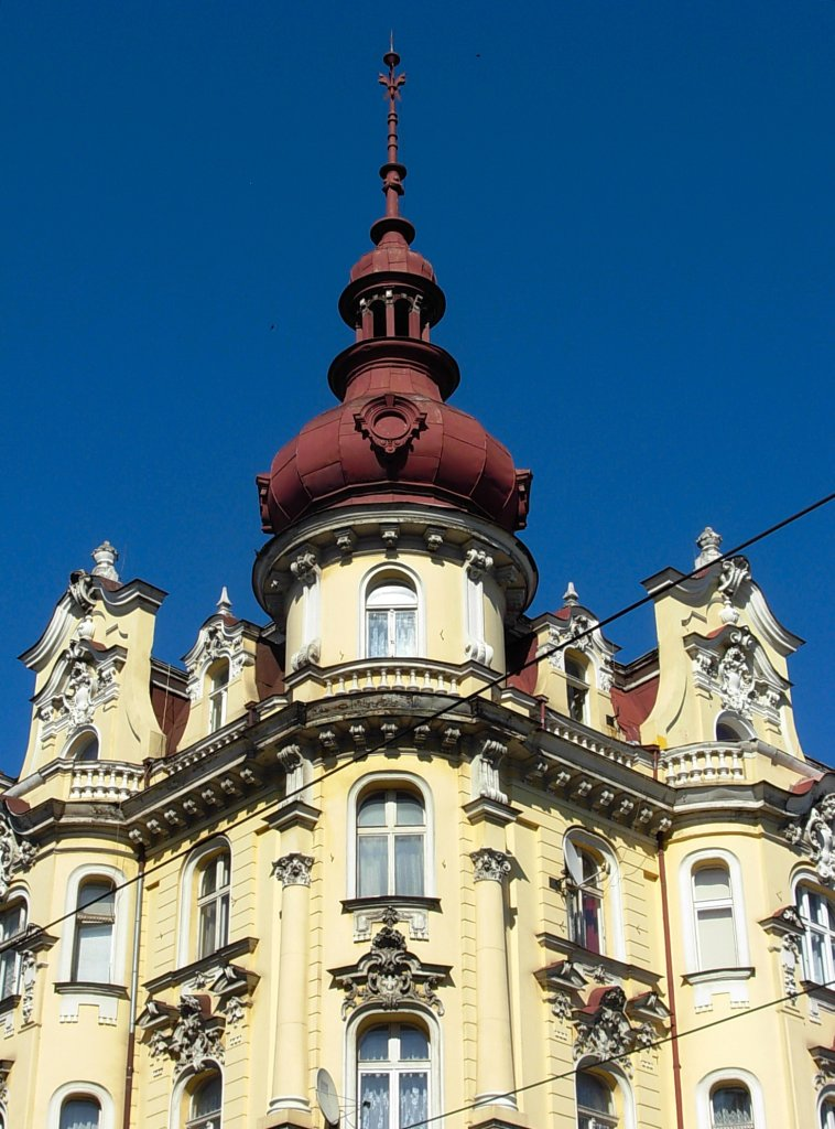 Kamienica neobarokowa Plac Wolności 1 w Bydgoszczy